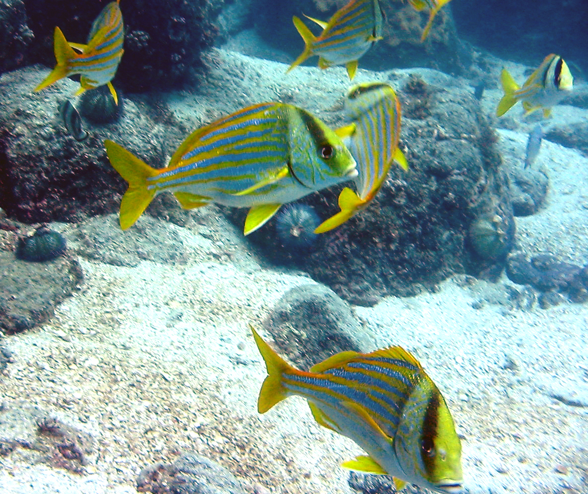 Salema, salema, roncador-listado-americano, ferrugem, frade, mercador, salema-branca, sambuari ou roncador-listrado-americano (Anisotremus virginicus). Peixe da família Haemulidae(Dactylopterus_volitans). Fish of the Haemulidae family